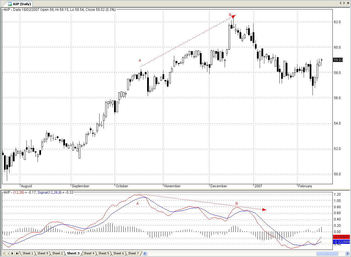 Este gráfico lo hice yo utilizando el programa AmiBroker.